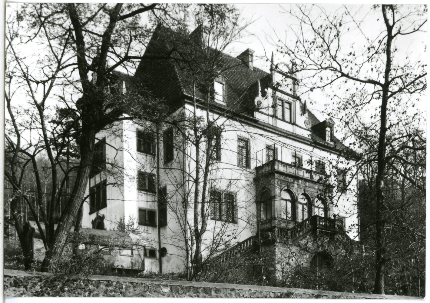 Radebeul; Hohenhaus, Puppentheatersammlung This postcard is from publisher Brück & Sohn in Meißen ( postcard has a unique number 30779 and is available in a higher resolution at the publisher. This images was uploaded in a cooperation project between Wikipedians and the publisher.